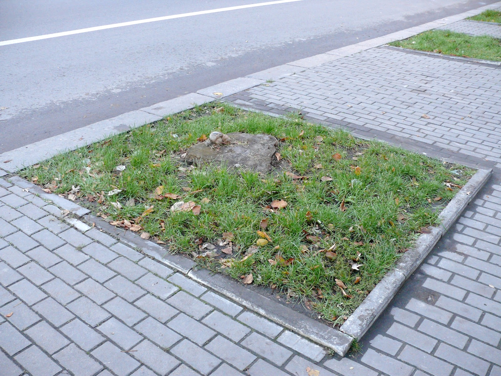 пень на Красноармейской